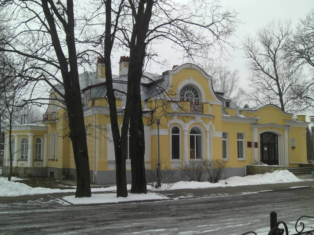 Особняк Рождественского в Гатчине. Построен в 1913 году, архитектор Н. В. Гастев